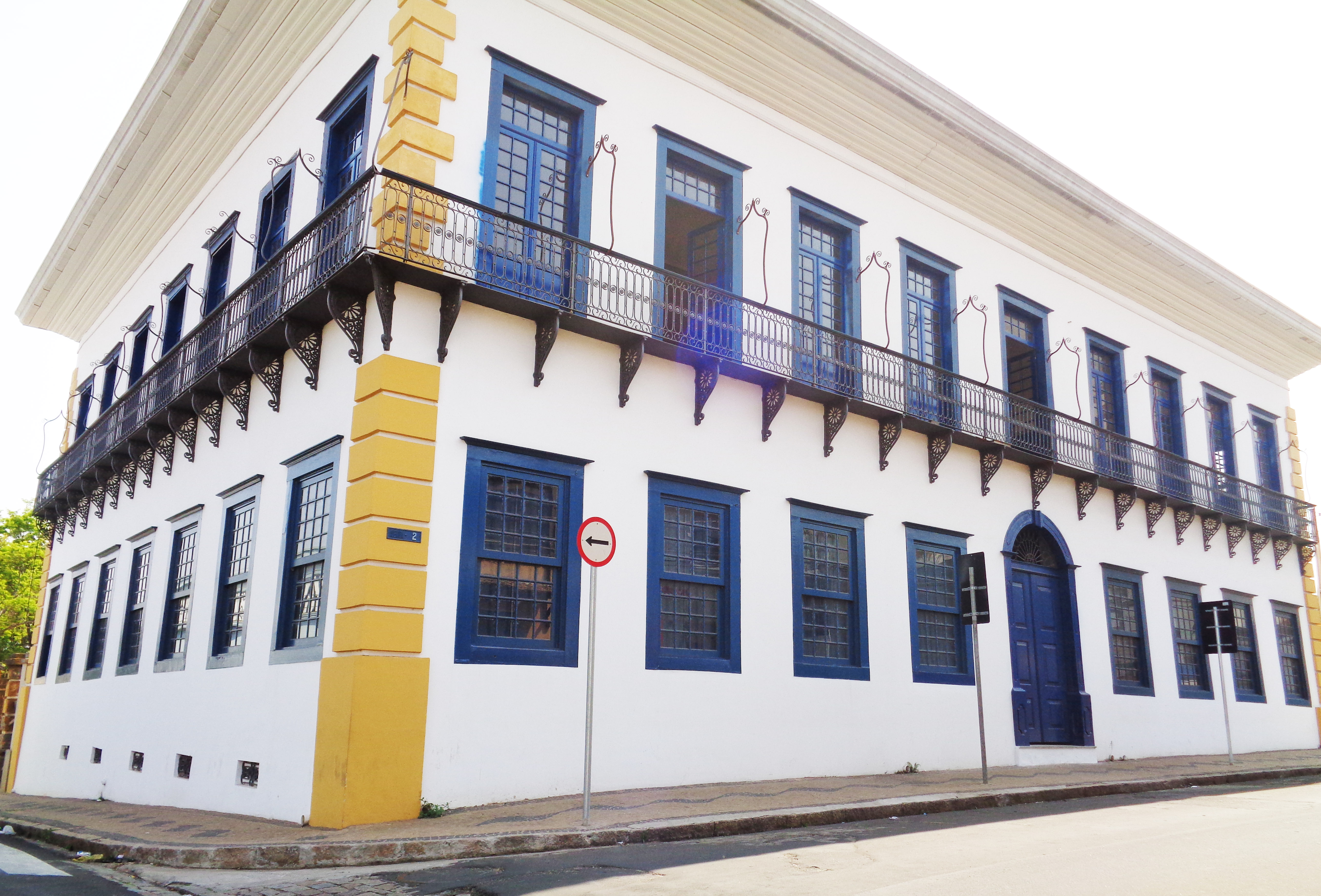 Casa à Avenida 2, nº 572, esquina com rua 7, Sobrado do Barão de Dourados